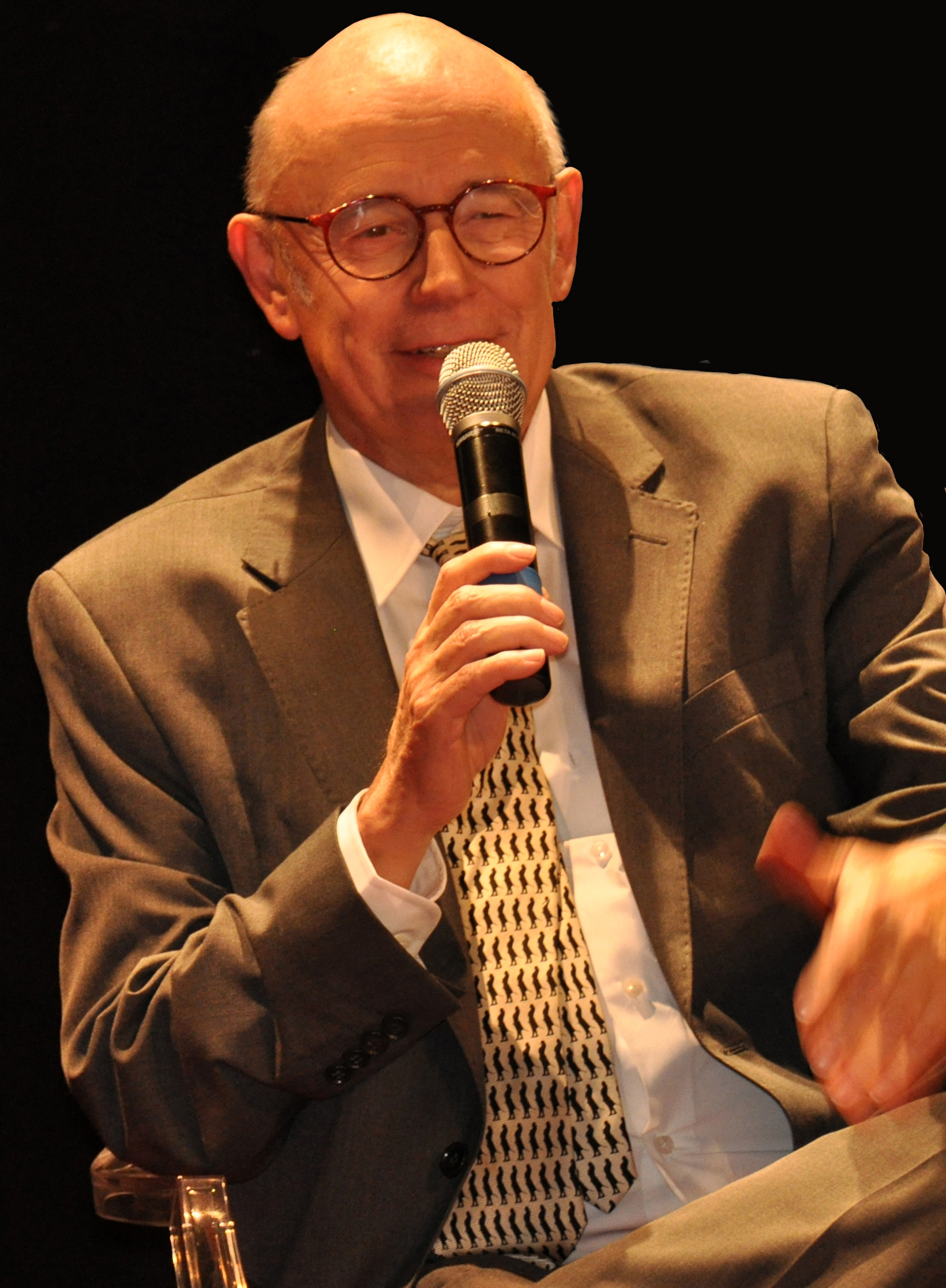 Jacques De Decker conférencier